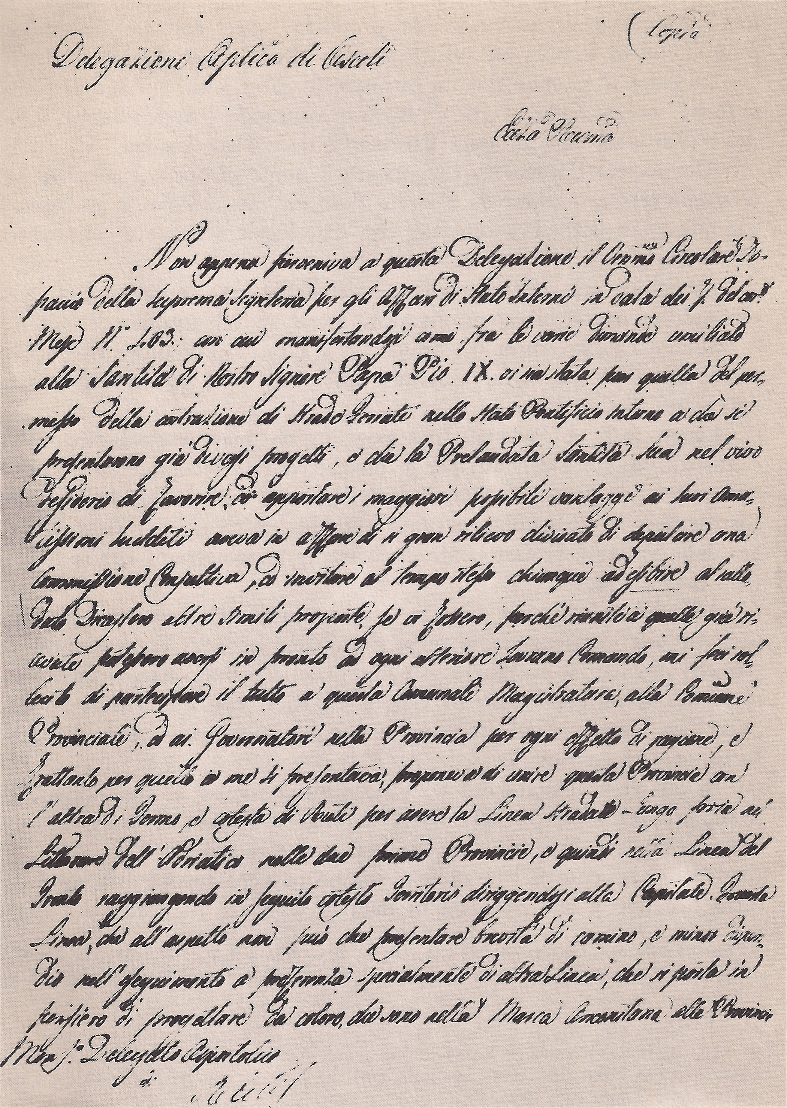 Lettera del 15 luglio 1846 con cui il delegato apostolico di Ascoli Piceno informa il delegato apostolico di Rieti del progetto di realizzazione della ferrovia Salaria, da Roma al mare Adriatico passando per Rieti, Ascoli e Fermo